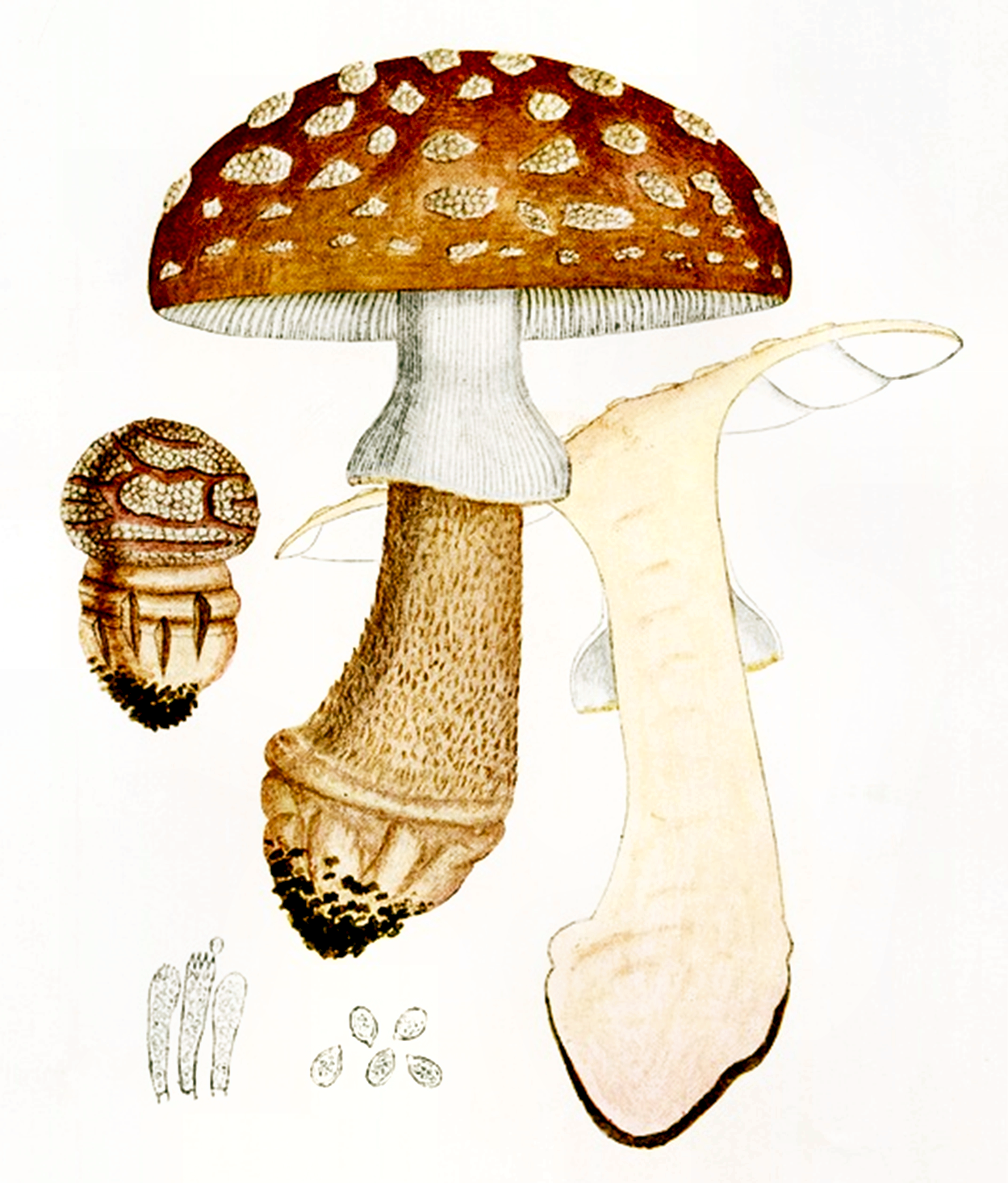 Giacomo Bresadola: Amanita rubescens, 1927